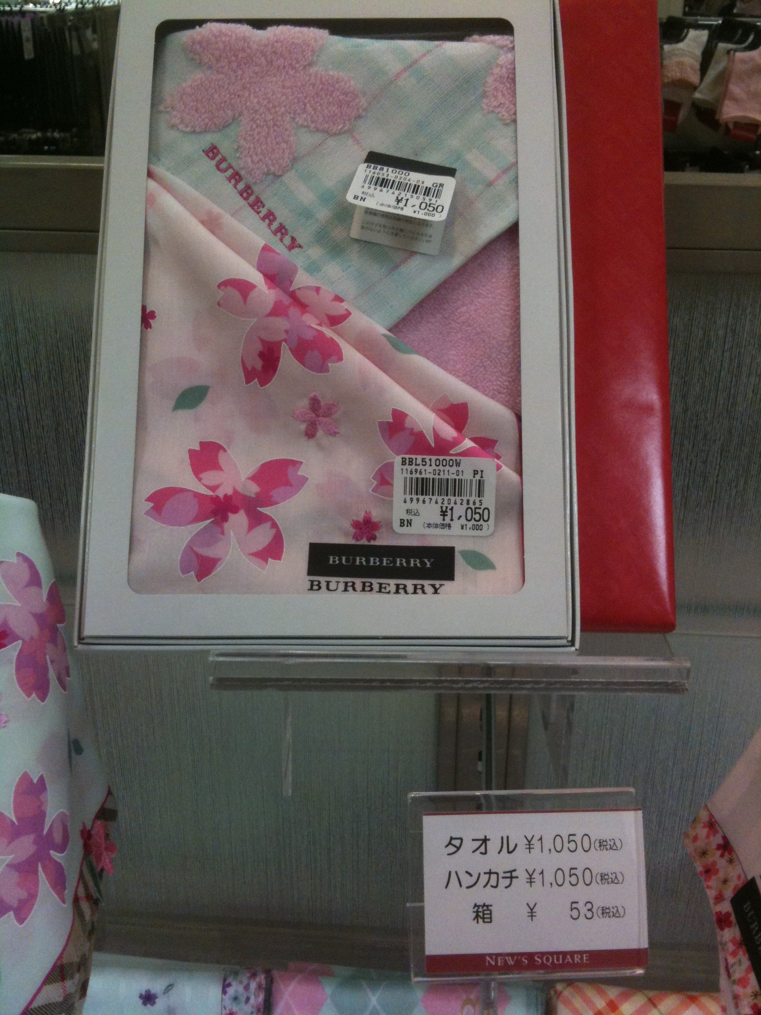 ホワイトデー視察